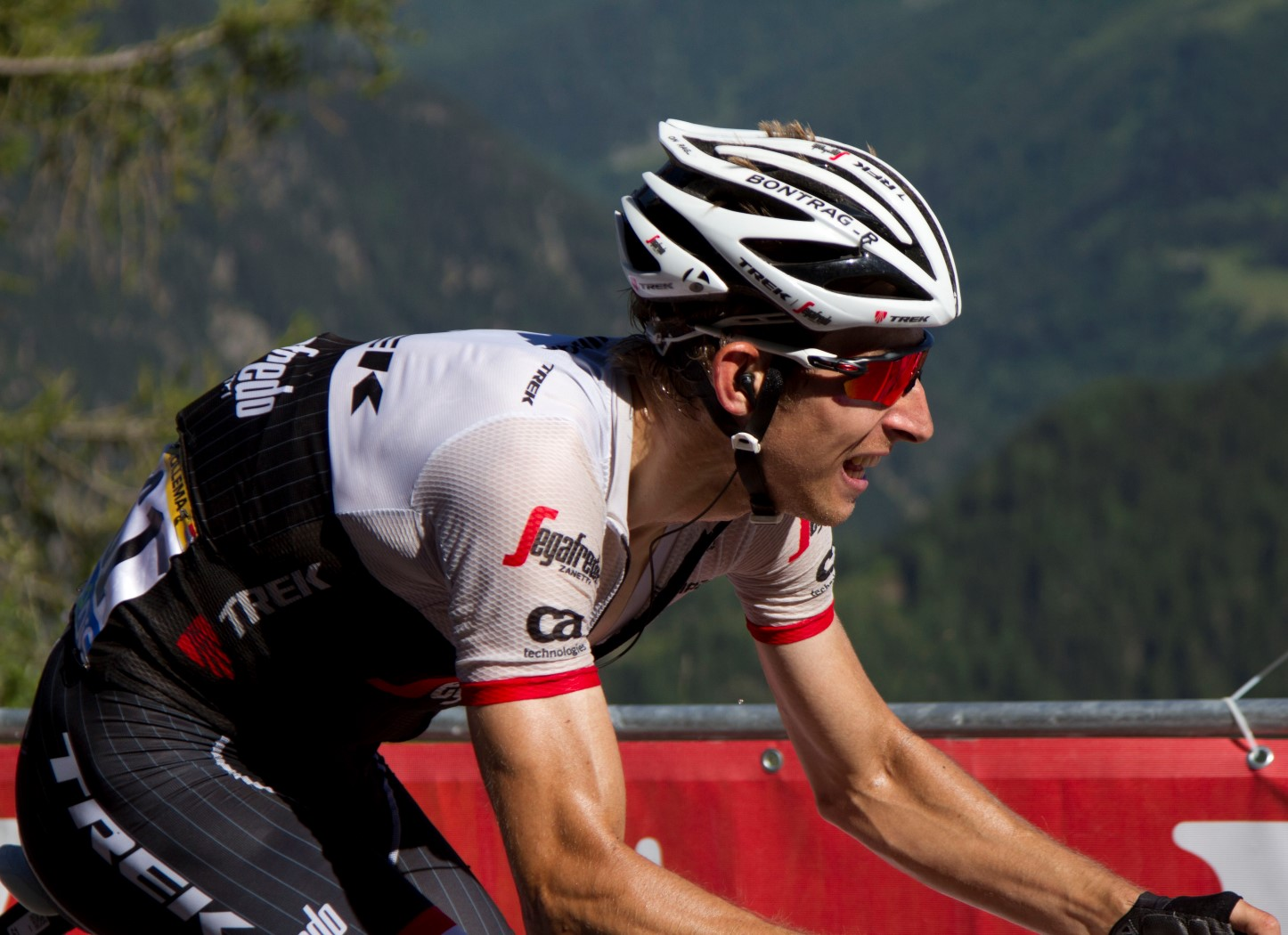 250 mollema